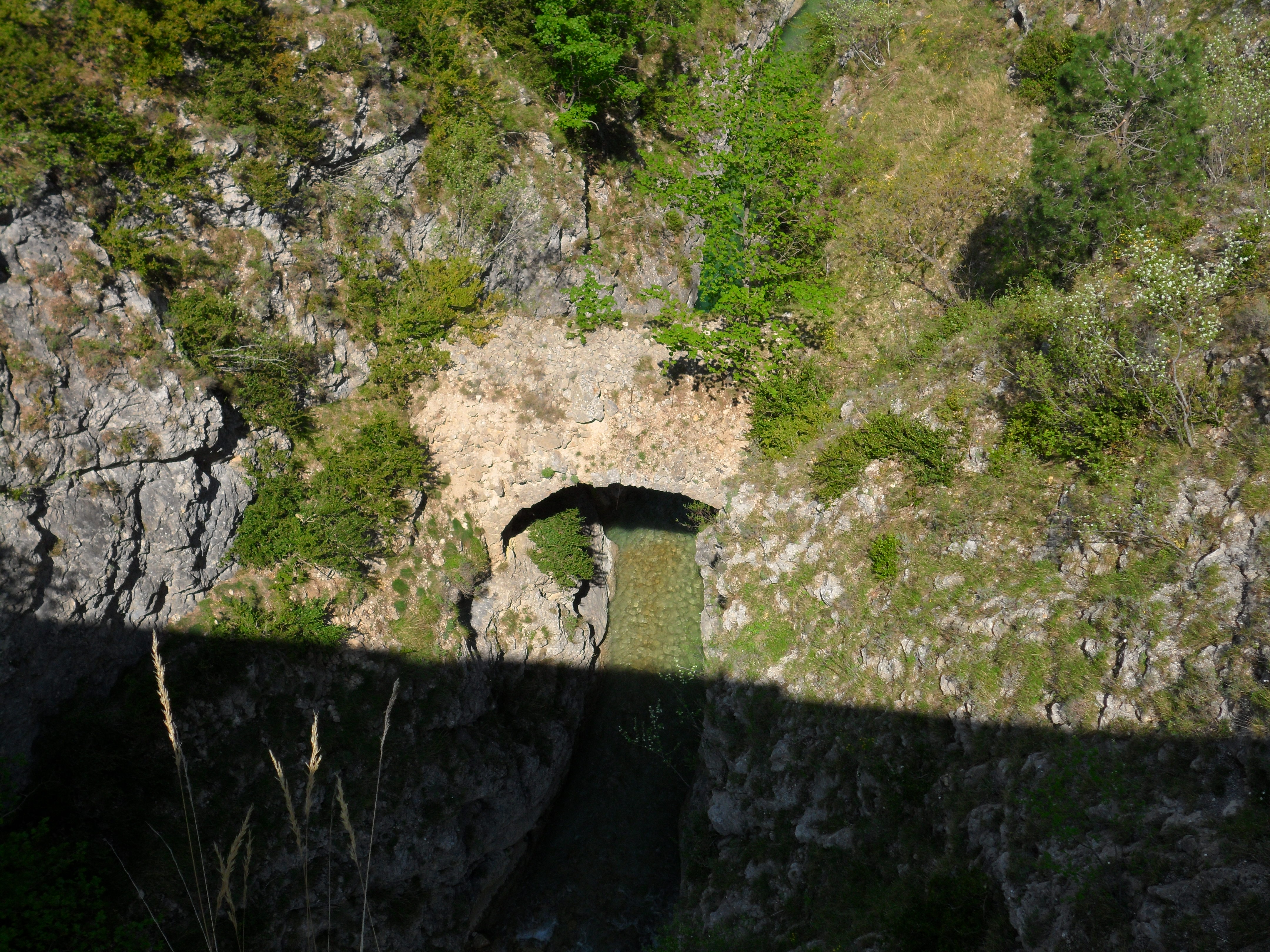 Vieux Pont Saint Joseph